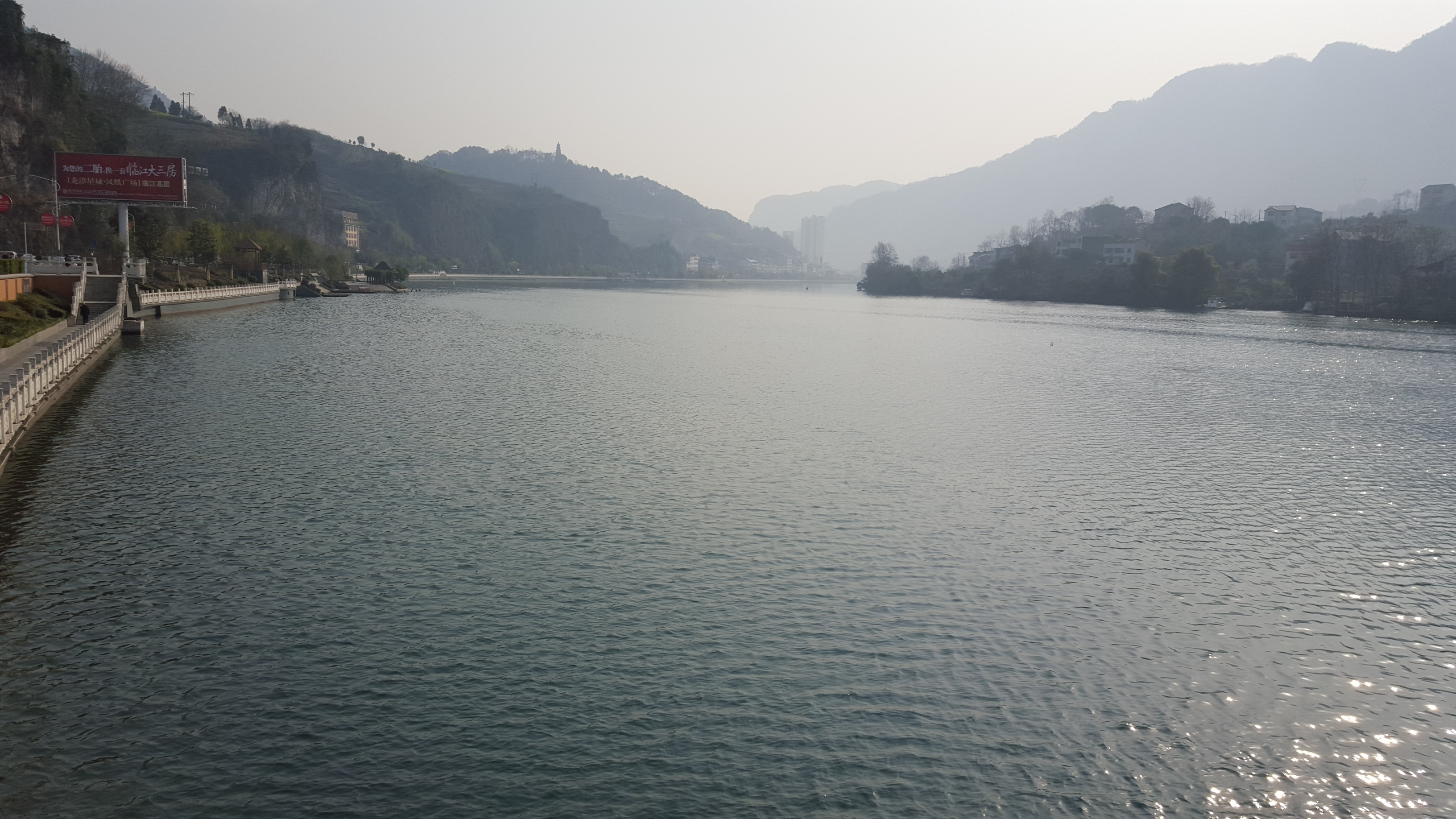 长阳土家族自治县境内的清江